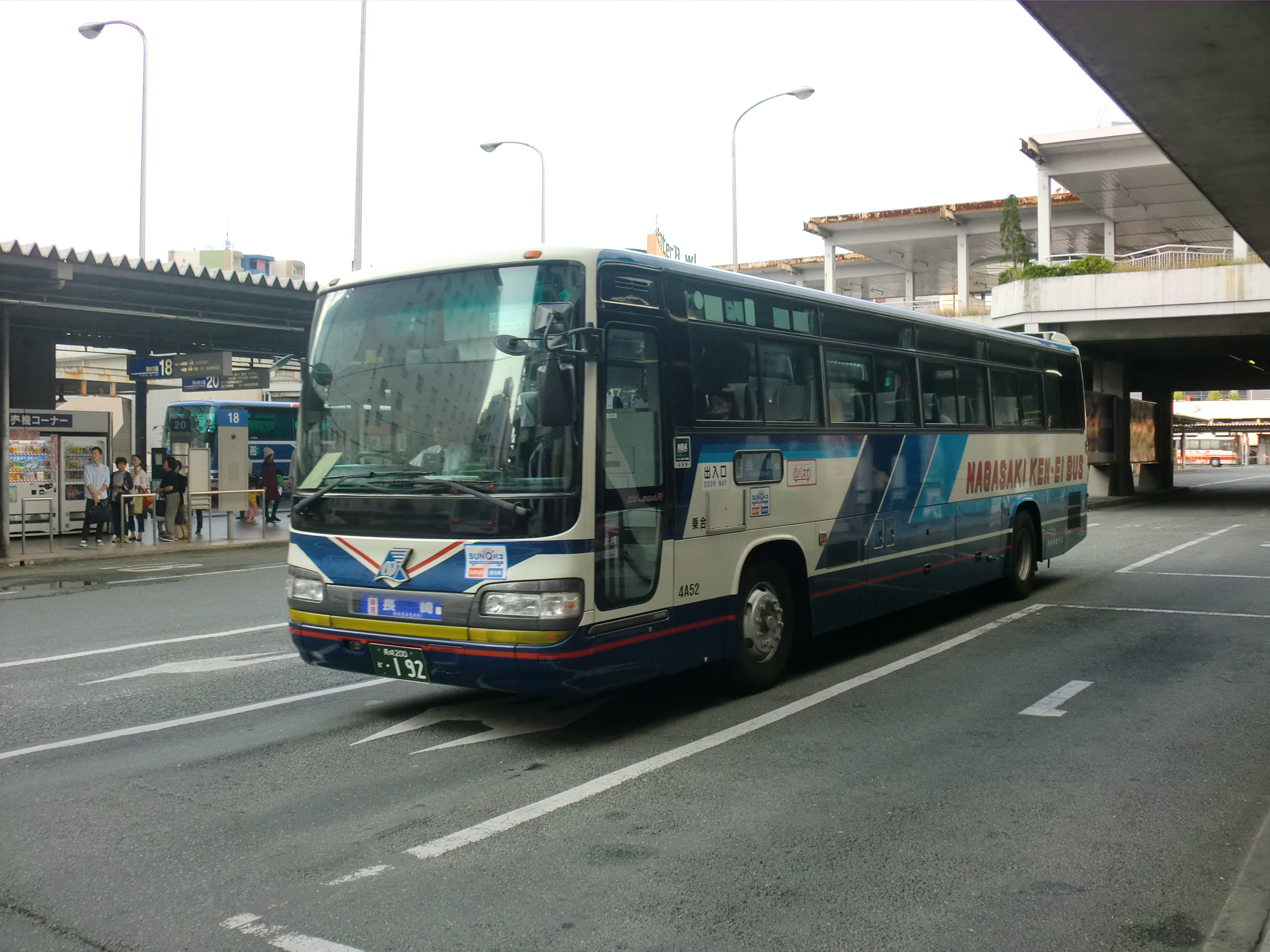 長崎県営バス高速バス（長崎-熊本線）